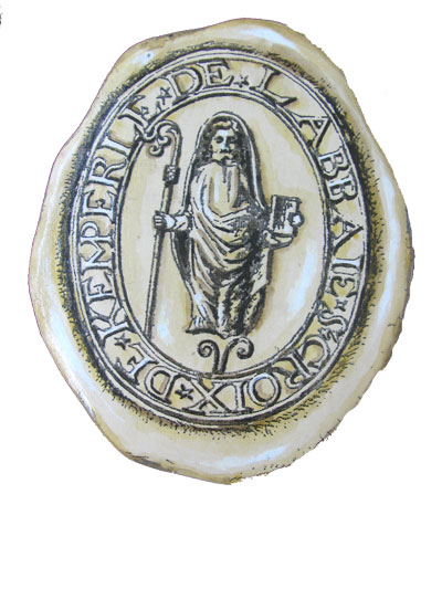 Description : Sceau de l'abbaye Sainte Croix de Quimperlé Lieu : Musée de la Citadelle du Palais, Belle Ile, Bretagne Auteur : Pline photo personnelle